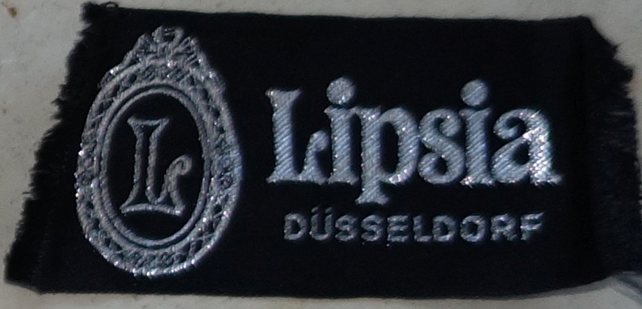 Einnähetikett der Firma Lipsia, Pelzhaus, Düsseldorf Königsallee.